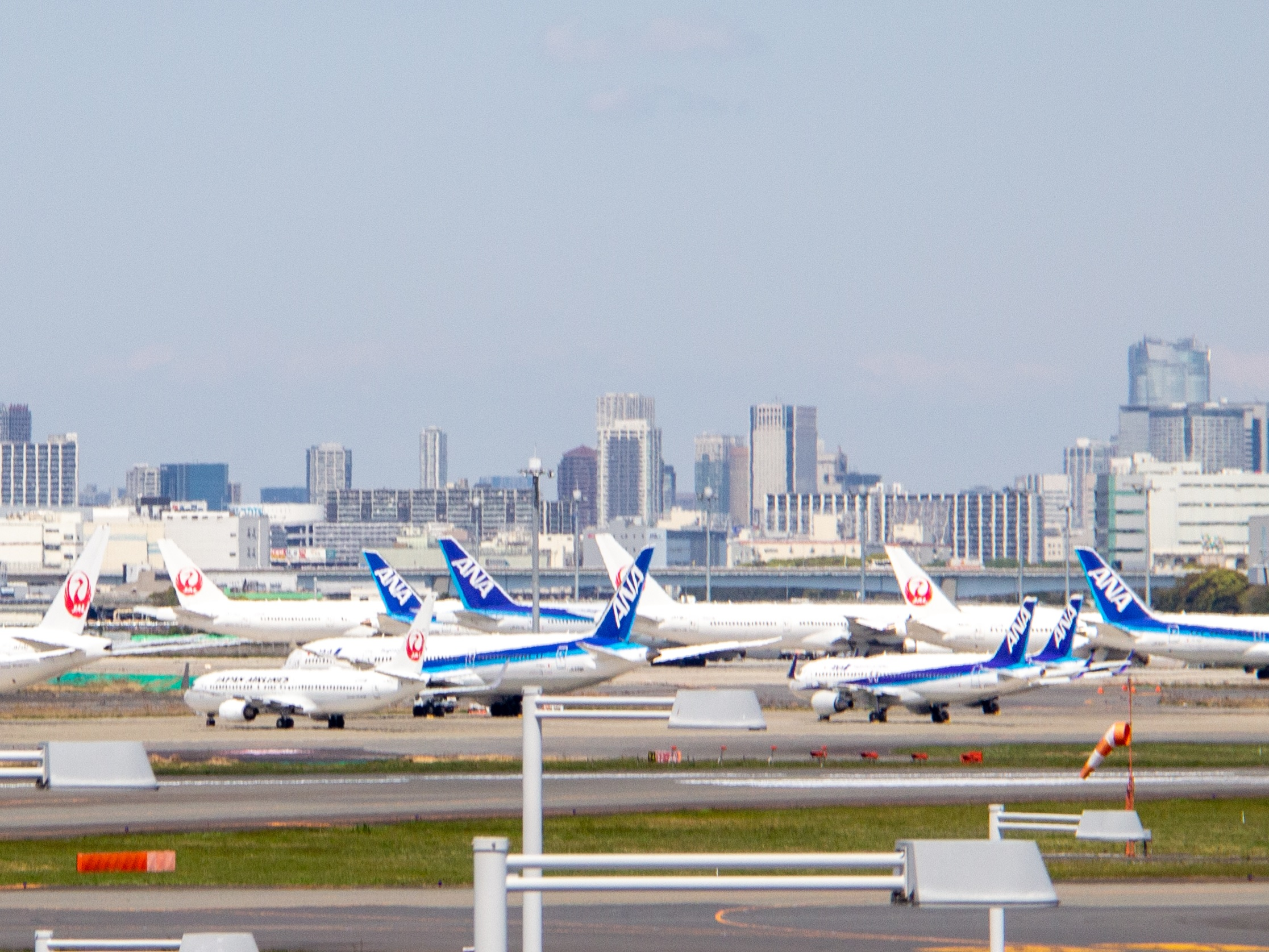 新型コロナウイルス感染症（COVID-19）の影響で多数の運航が取りやめになって羽田空港に置き留めされた航空機